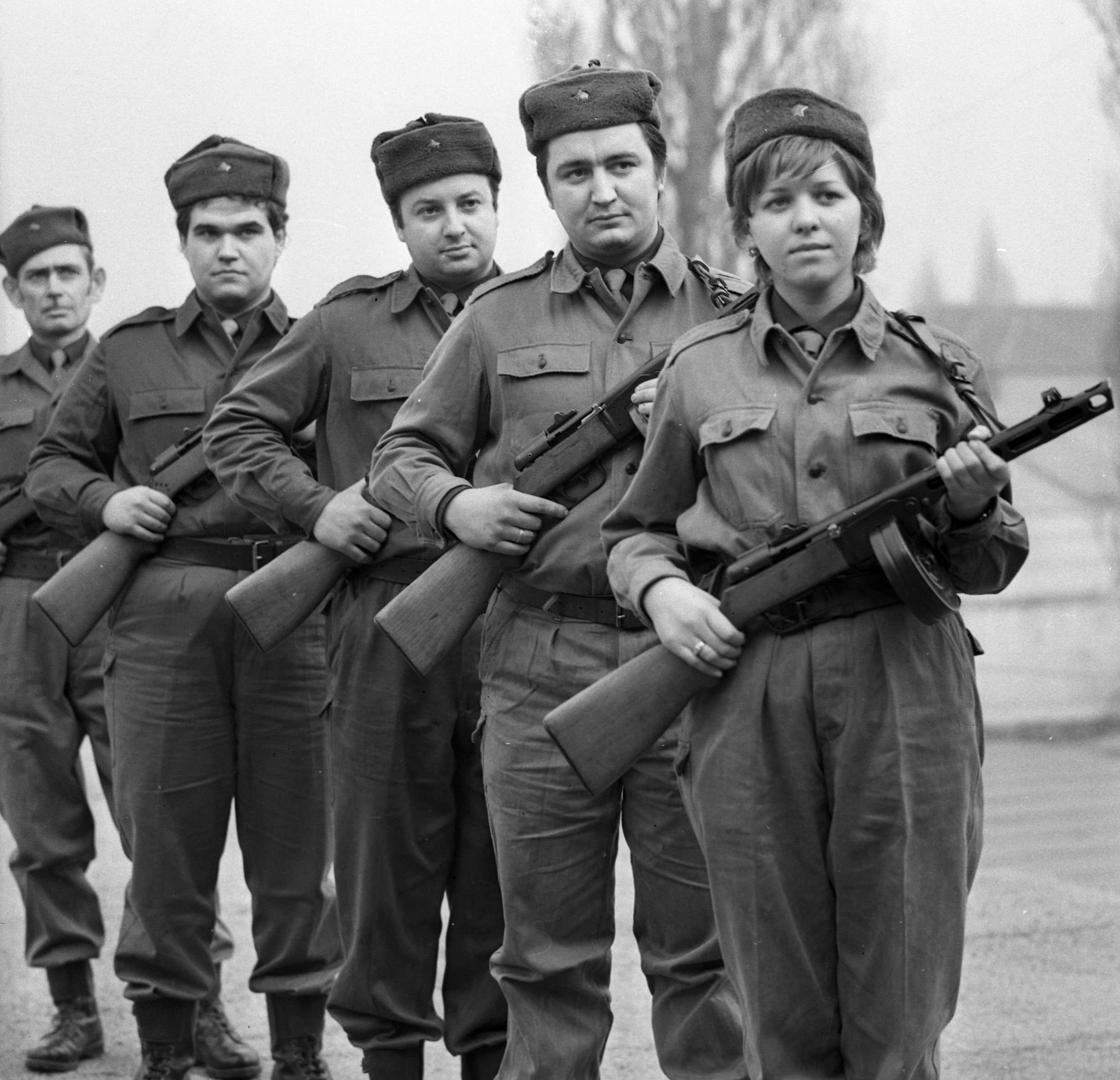 Magyar munkásőrök és a PPS-41 mintájú géppisztolyaik. A 71 lőszert befogadó csigatár lehetővé tette a nagymennyiségű lőszert felhasználó épületharcokban való sikeres részvételt. Ennek a tipusnak csigatára van, ahol spirálisan helyezkednek el a pisztolylőszerek. A helytelenül alkalmazott "dobtáras" elnevezés emiatt téves. Könnyített, behajtható válltámasszal Magyarországon készítették a Honvéd Karhatalom ("pufajkások") számára egy változatát. Ezt az alapfegyvert egészen a 70-es évek elejéig a Munkásőrség használta.